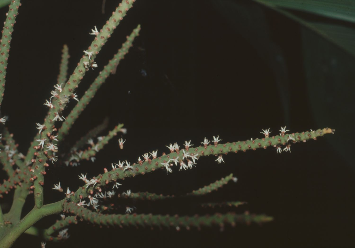 Geonoma congesta subsp. osensis, Palmen (Arecaceae) - Costa Rica: Prov. Puntarenas, PN Piedras Blancas, Bosque Esquinas bei La Gamba